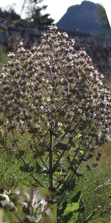 Sauge d'Ethyopie, Haute-Maurienne, 2012